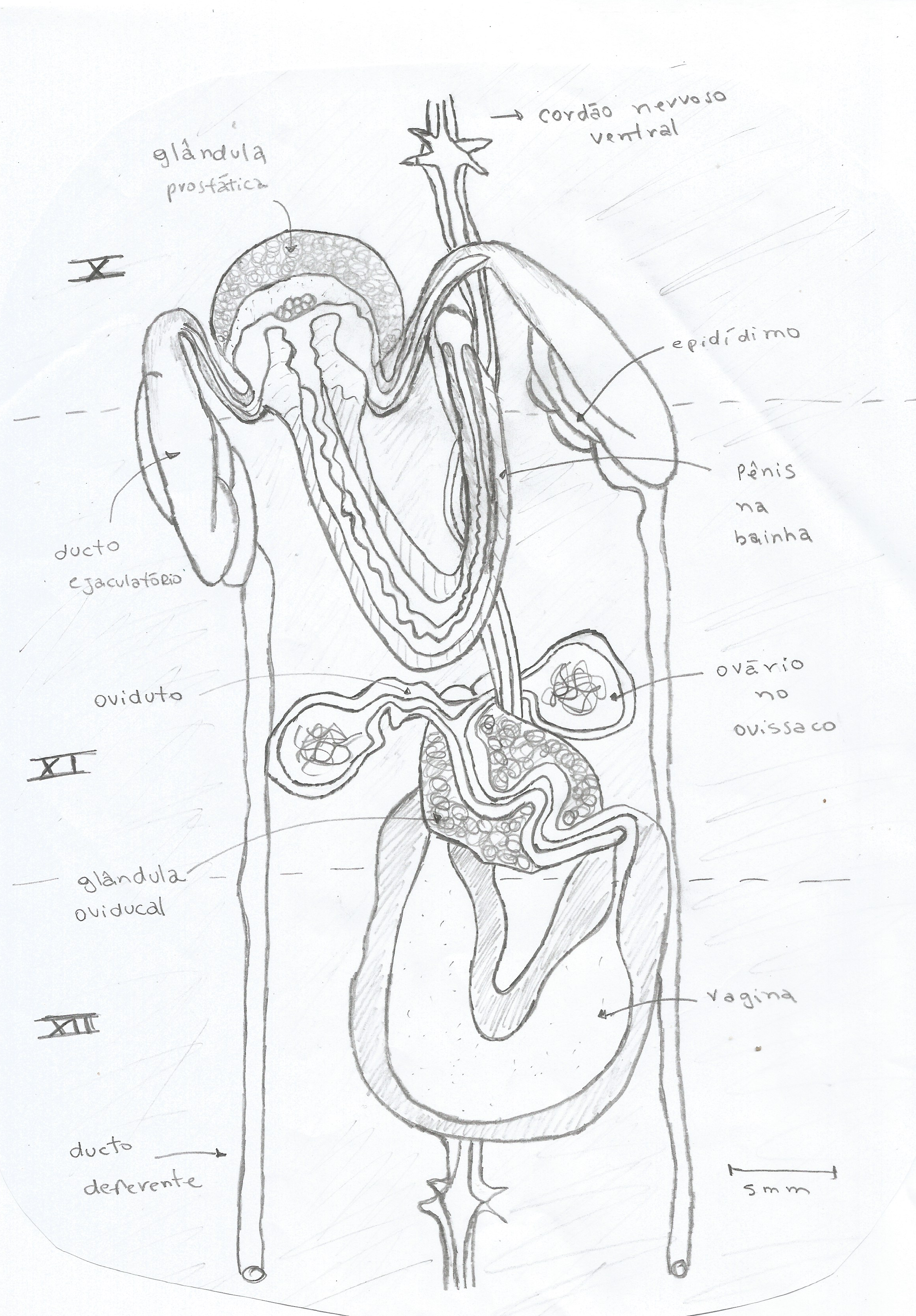 Órgão reprodutores de Hirudo. Os testículos estão associados ao ducto deferente em segmentos posteriores.